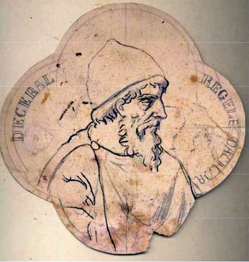 Decebal - Regele dacilor, creion, BAR CS - studiu pentru blatul mesei cu care Theodor Aman a câștigat Medalia de clasa a II-a a Expoziției artiștilor în viață din anul 1870 - Muzeul Theodor Aman din București